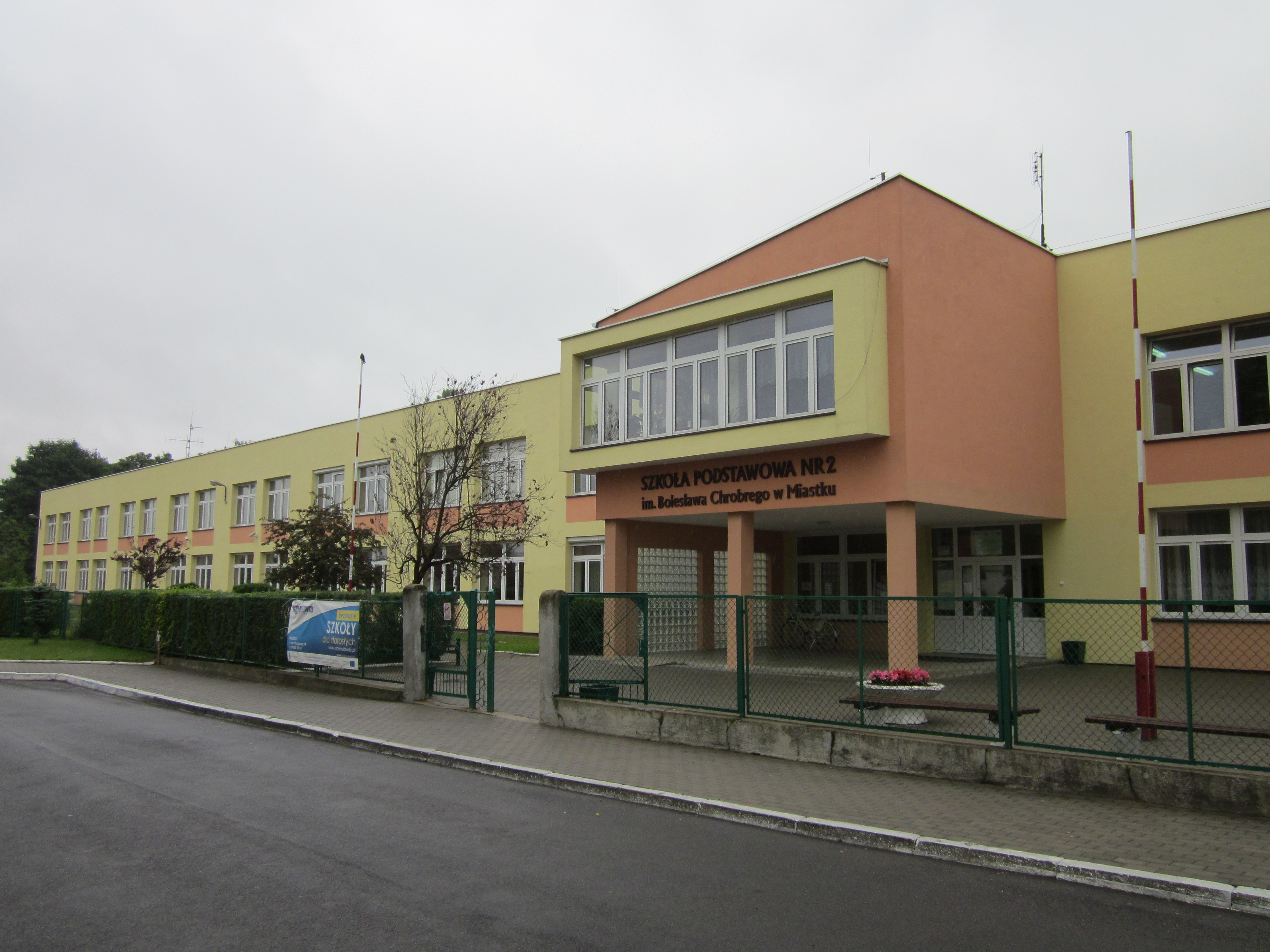 Budynek Szkoły podstawowej nr 2 im. Bolesława Chrobrego znajduje się przy ul. Kujawskiej 1.